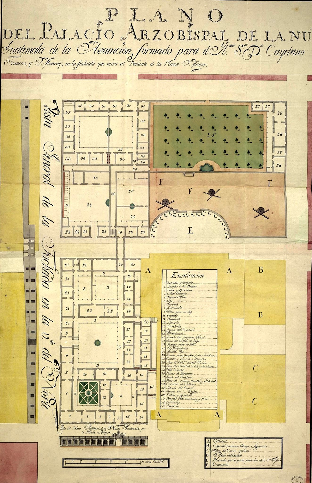 Palacio Arzobispal de la Nueva Guatemala de la Asunción preparado para el arzobispo Cayetano Francos y Monroy en 1779